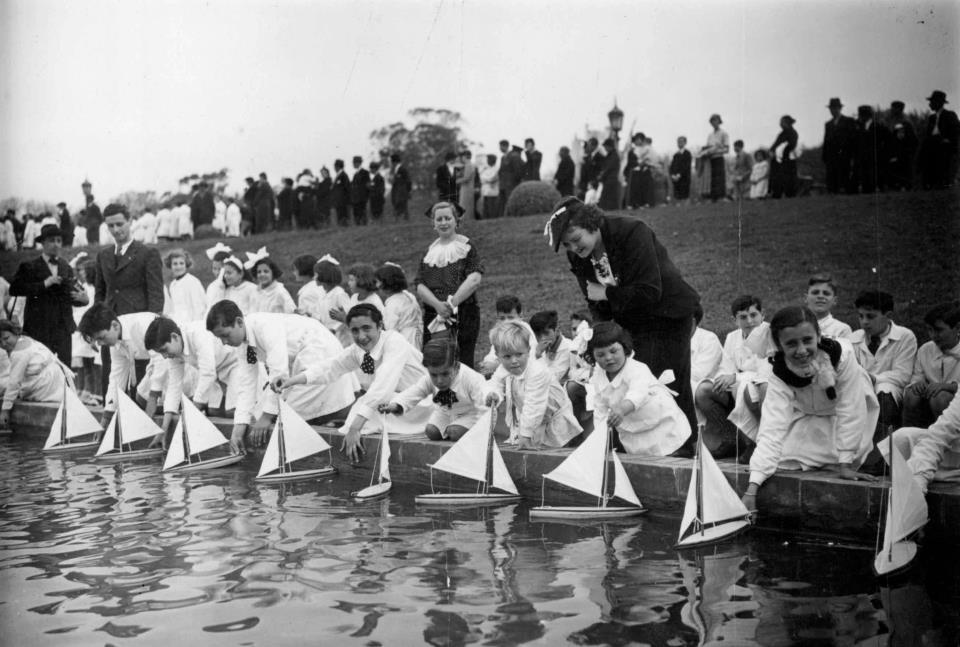 Escolares de primaria lanzan veleros a escala en la fuente de Plaza Urquiza, hoy llamada Plaza Rubén Darío. Buenos Aires, Argentina.